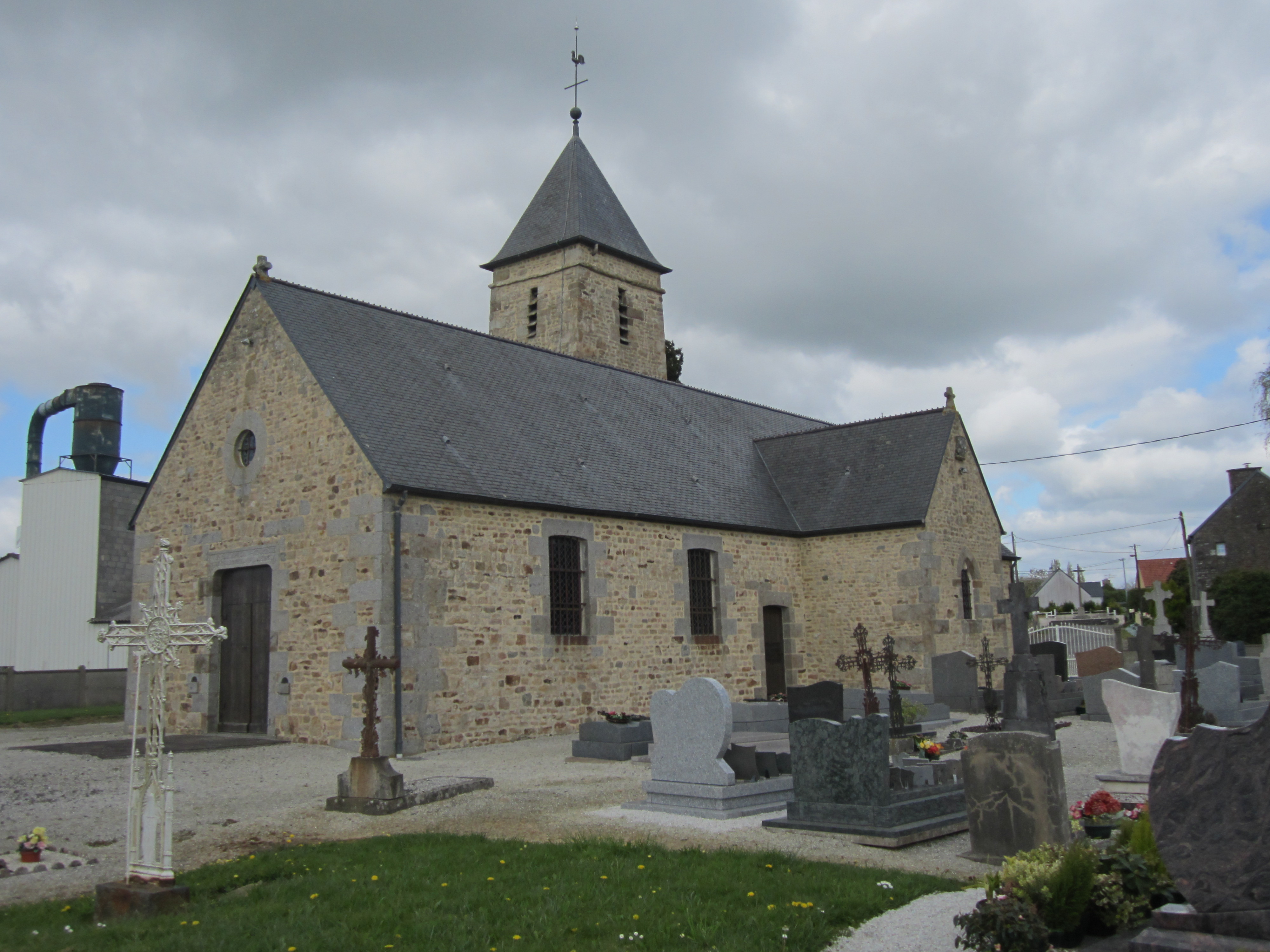 Noirpalu, Le Tanu, Manche